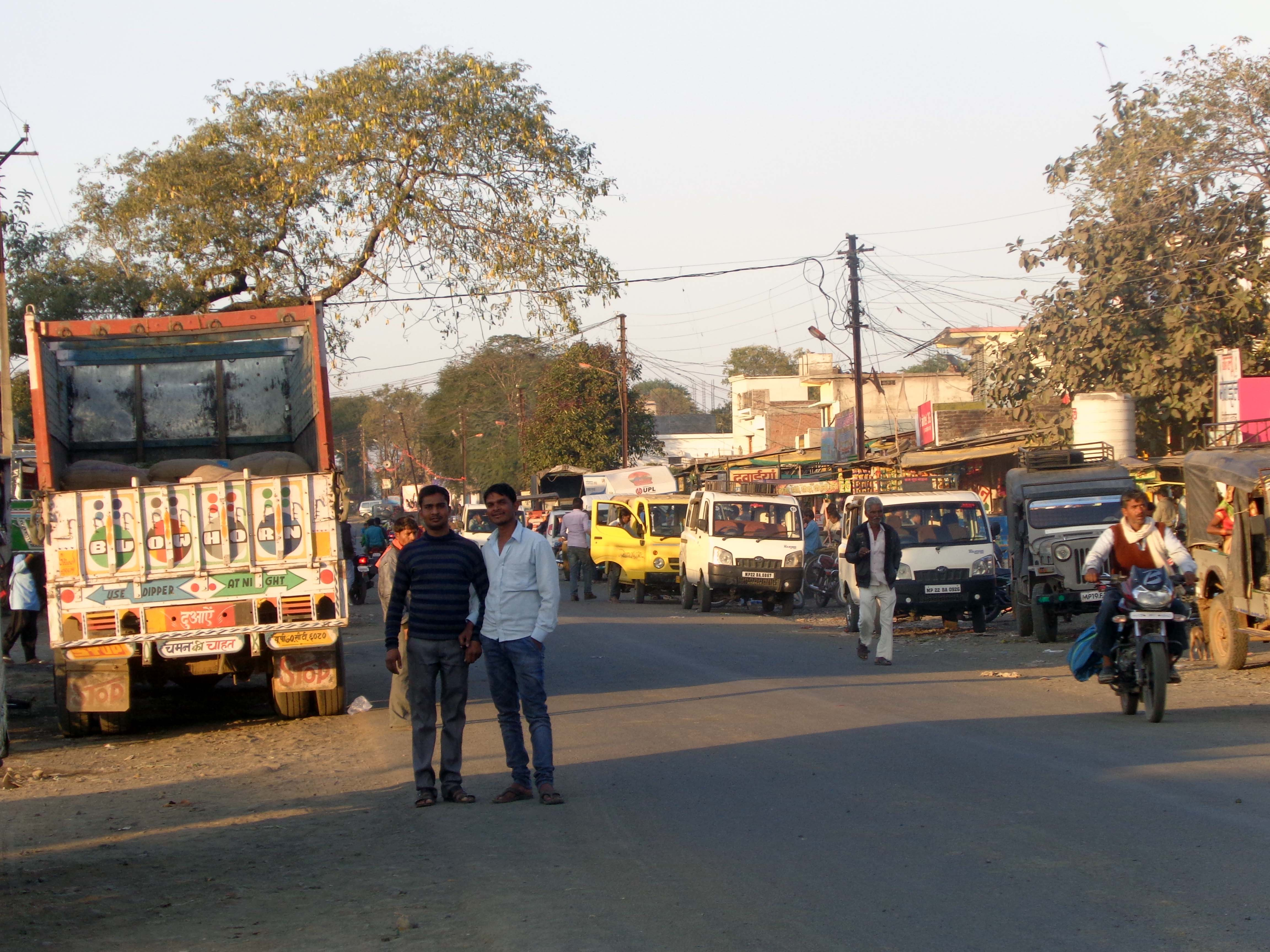 hi:बंडोल